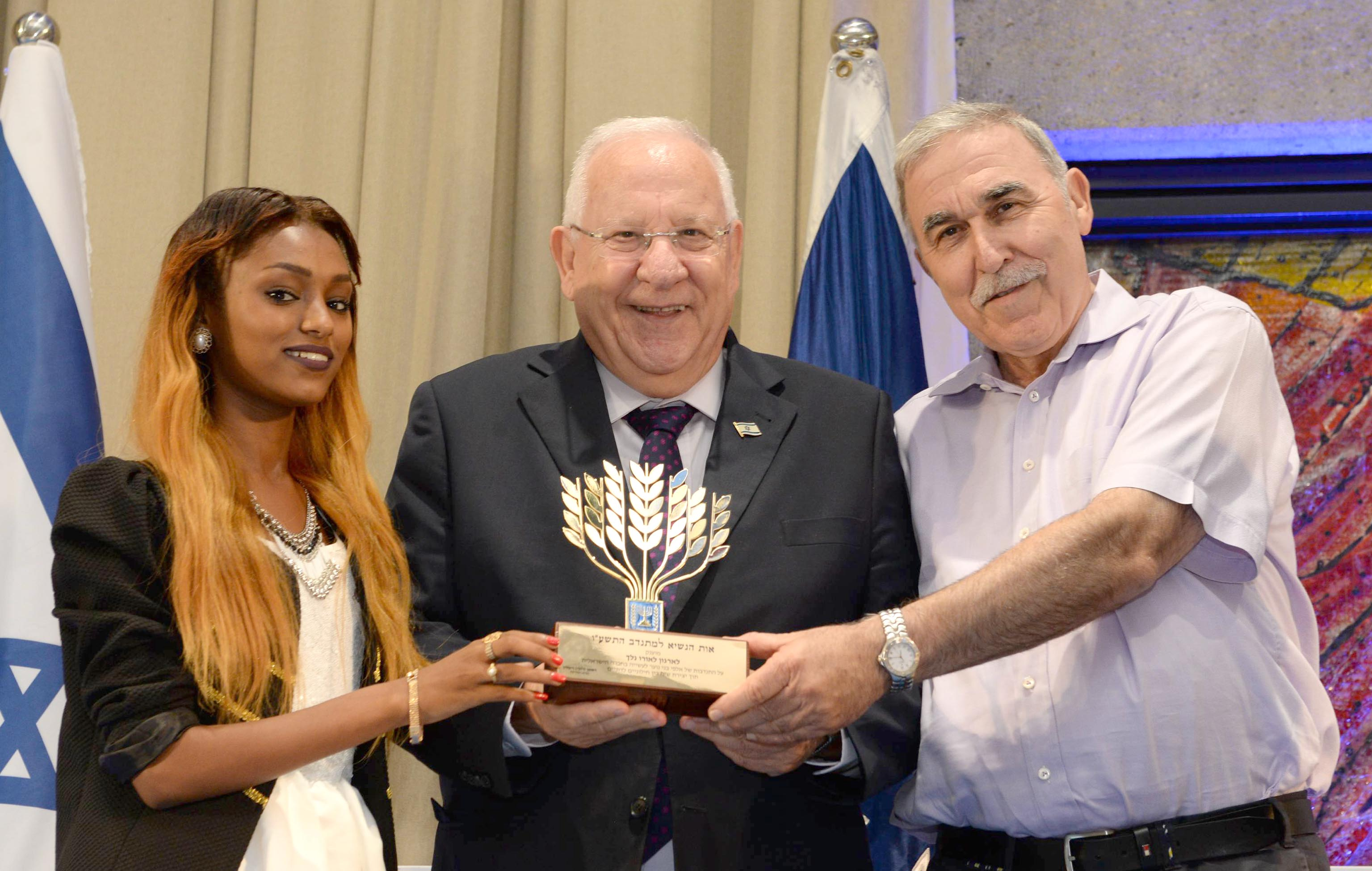 נשיא מדינת ישראל ראובן ריבלין מעניק את אות הנשיא למתנדב לשנת תשע"ו באירוע חגיגי בבית הנשיא לארגן לאורו נלך